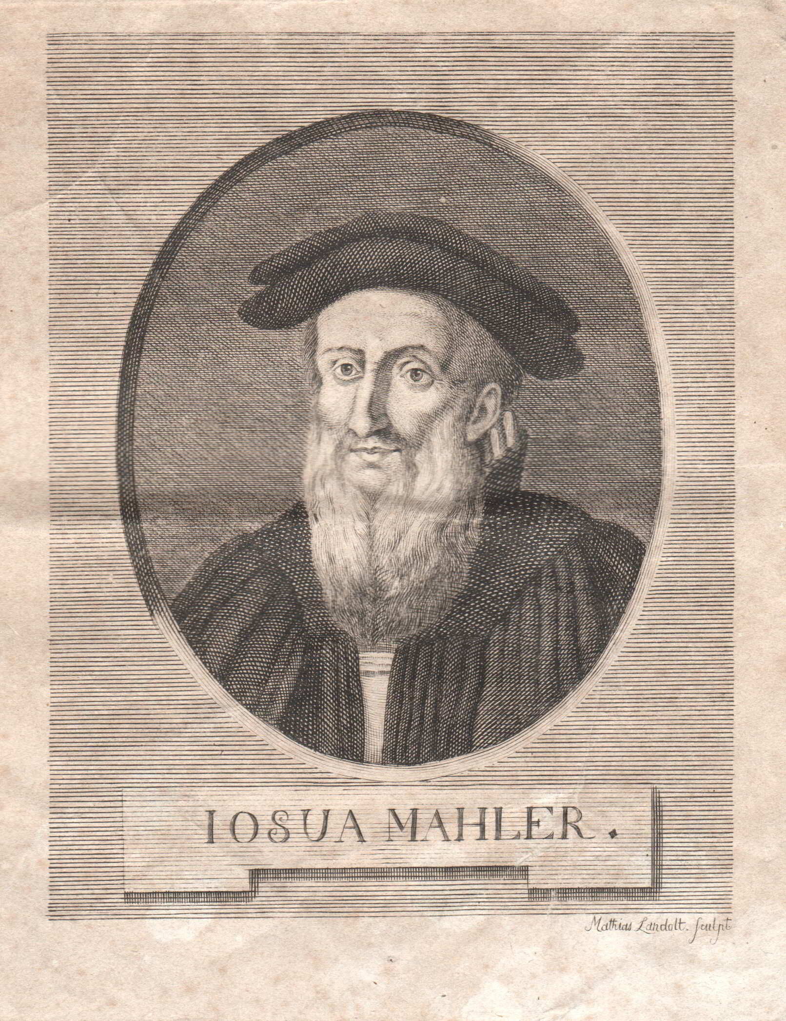 Porträt des Zürcher Lexikographen und Pfarrers Josua Maaler (1529–1599)